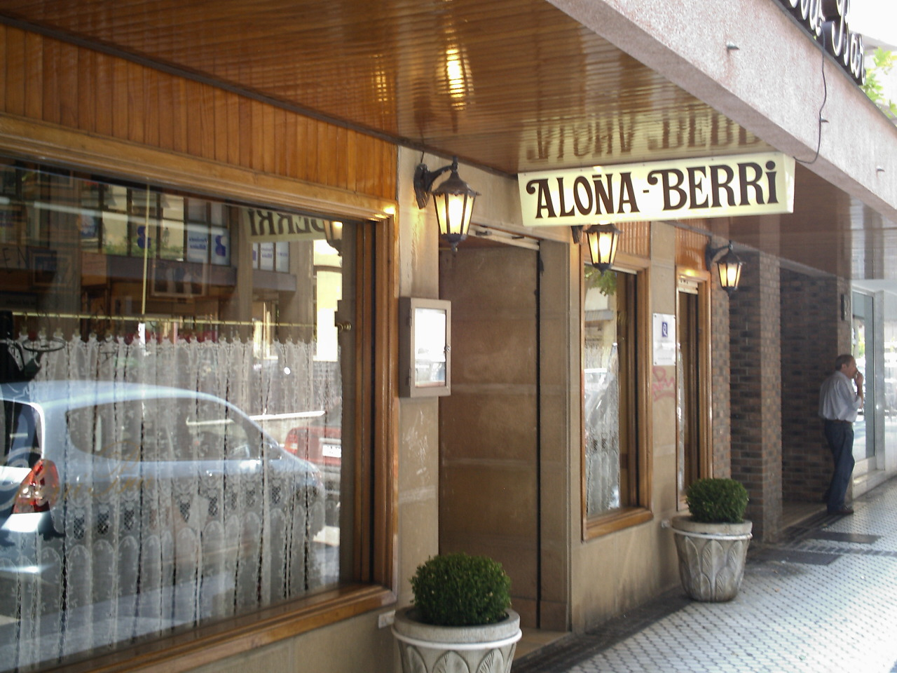 Aloña Berri, situado en Donostia (País Vasco, España), es un Bar que ha conseguido las mayores distinciones en la creación de pinchos. _Donostia_Spain.JPG